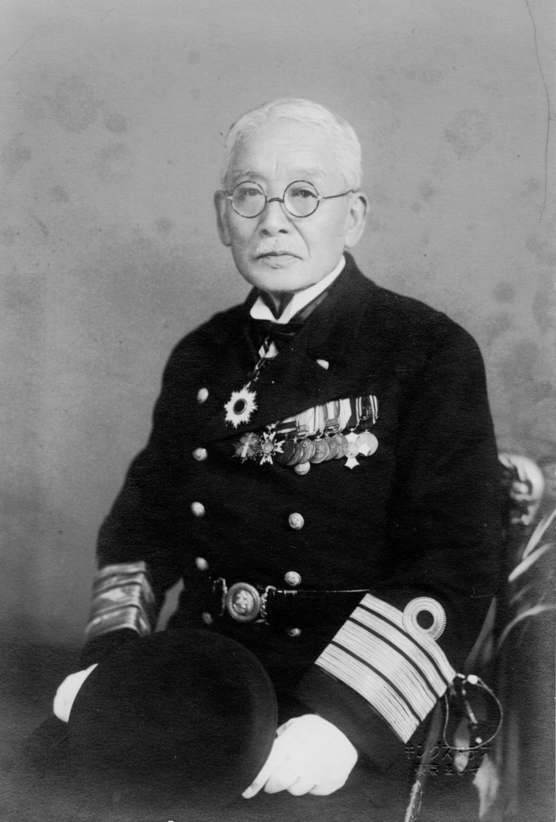 澤鑑之丞肖像写真